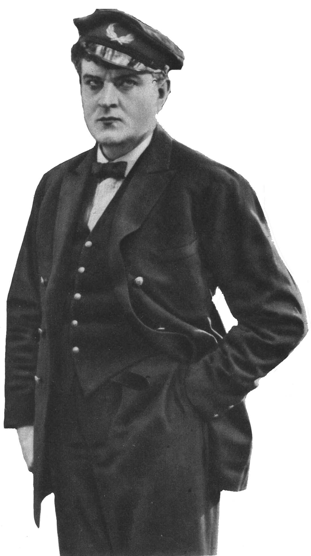 Sångaren Ernst Rolf (1891-1932) i titelrollen i filmen Styrman Karlssons flammor (1925).